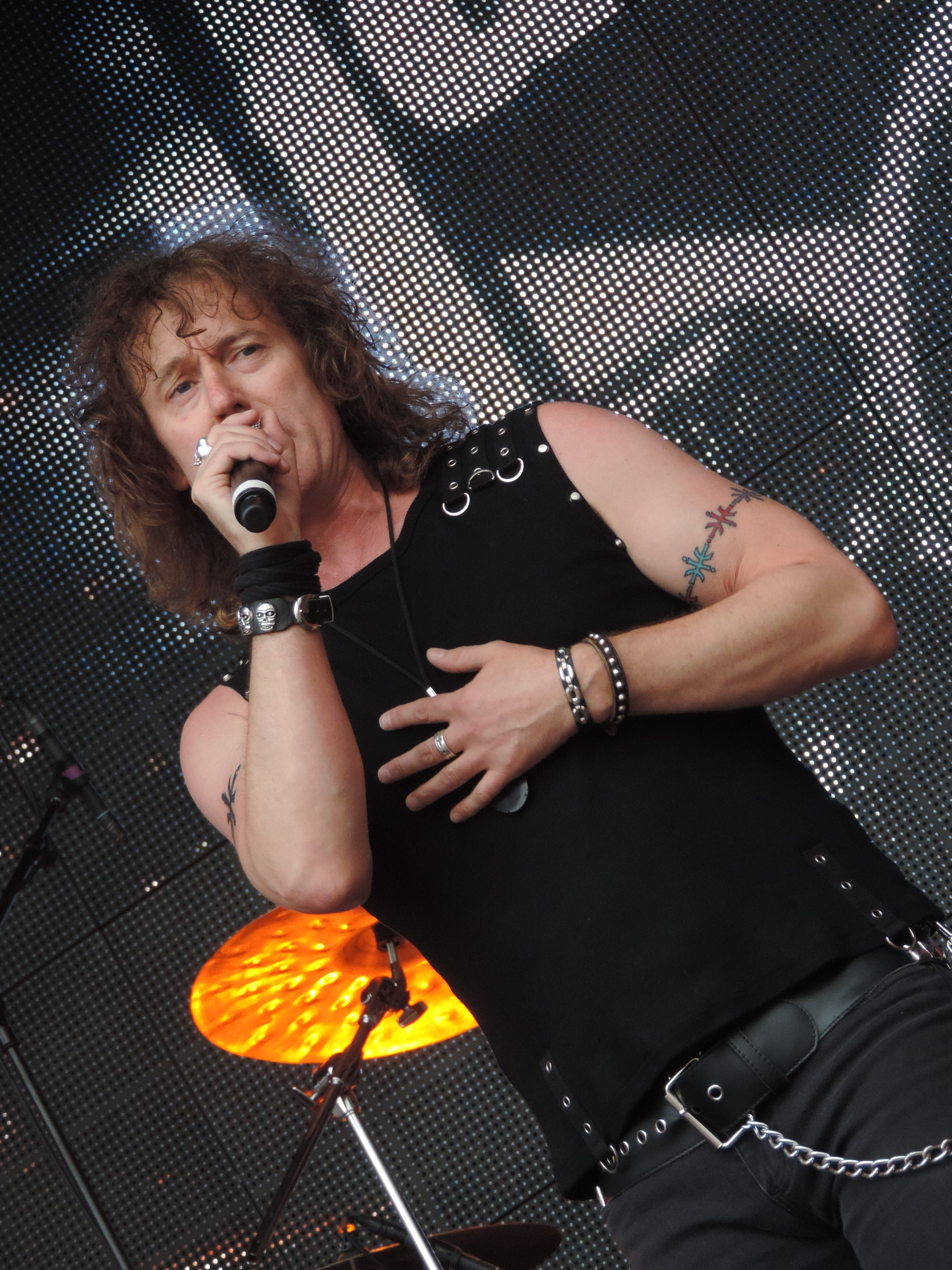 Carl Sentance von Nazareth live beim Linzer Kronefest 2016